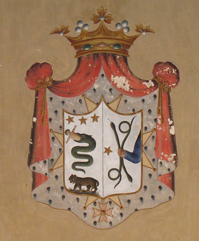 Stemma della Famiglia Martinetti-Bianchi di Chieti